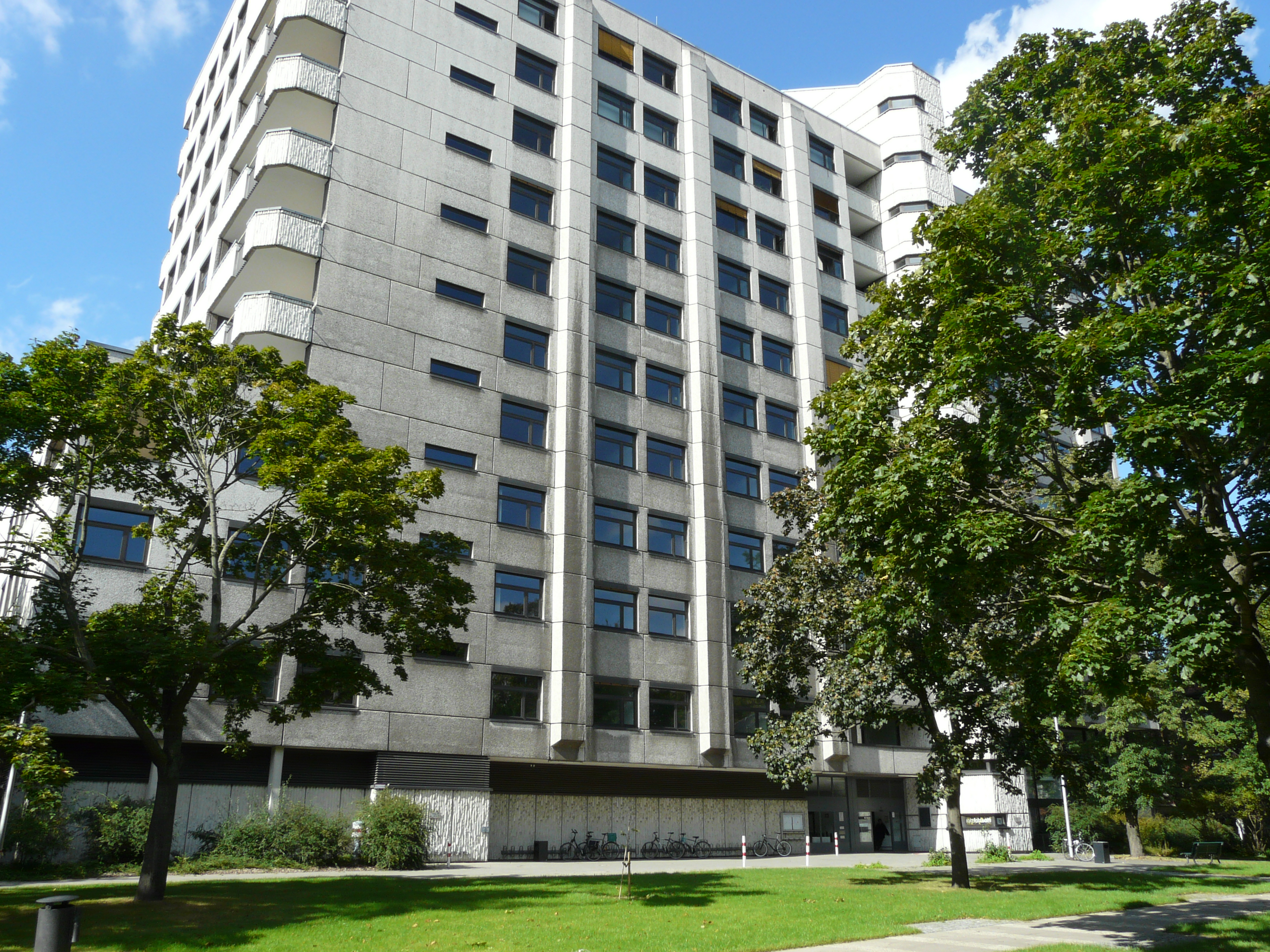 Hauptgebäude Haus A des LAGeSo auf dem Gelände in der Turmstraße 21 in Berlin Moabit